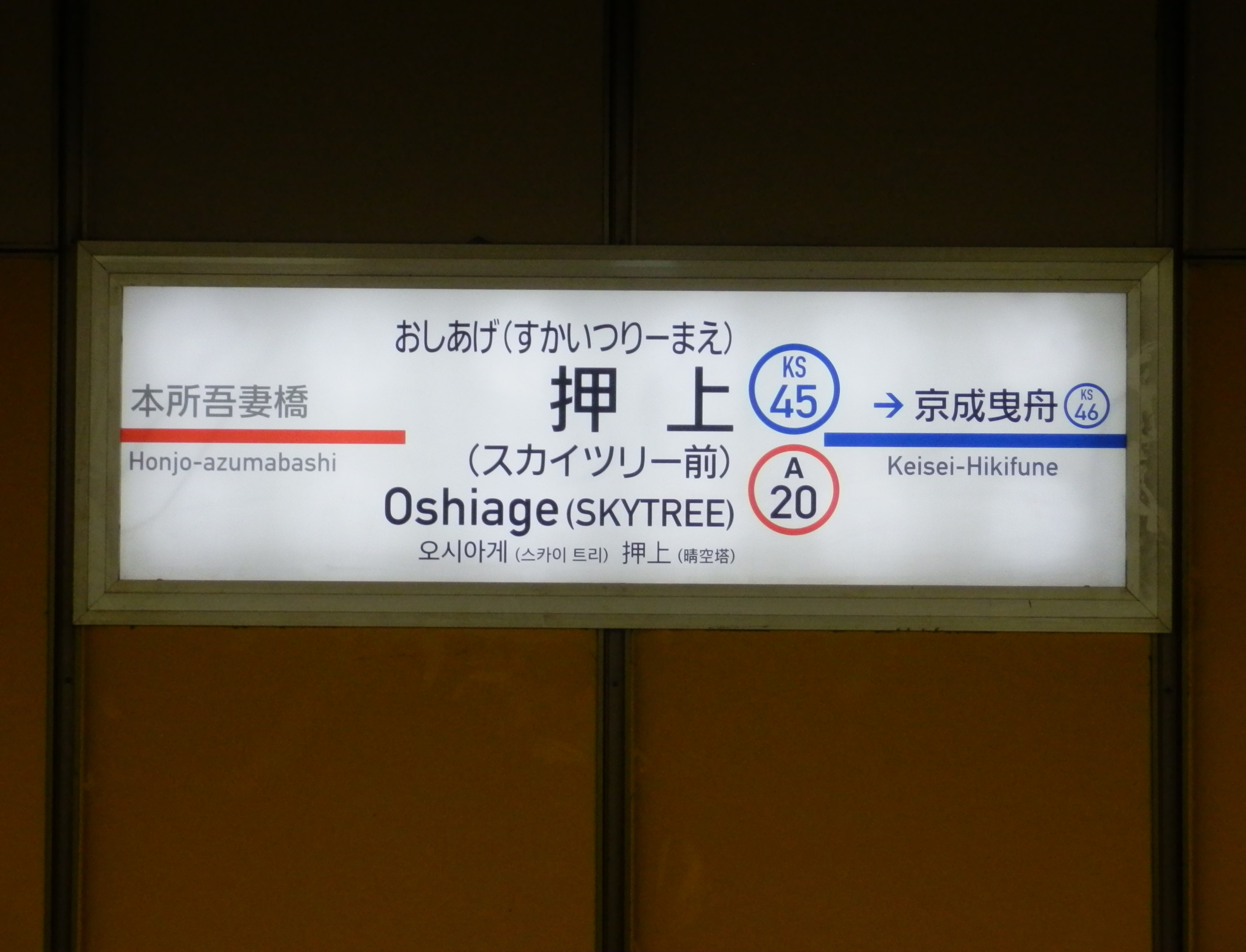 都営・京成押上駅の駅名標（更新後）